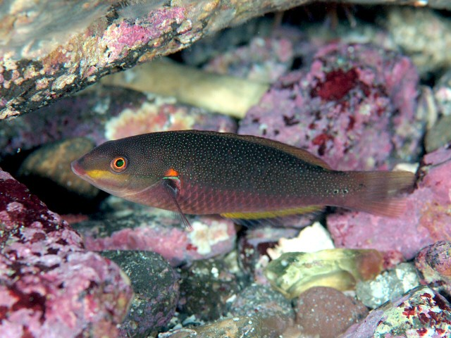 アカオビベラ Stethojulis bandanensis